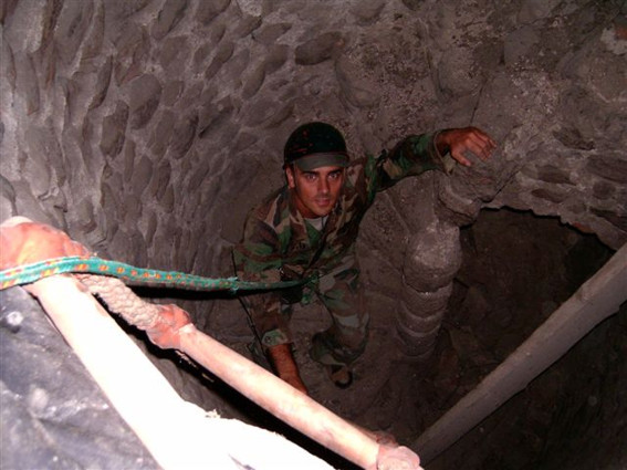 Maciej Boryna bei der Forschung in der Marienkirche in Szprotawa (Sprottau).